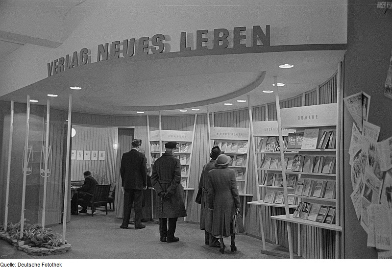 Original image description from the Deutsche Fotothek Messebesucher am Stand des Verlags Neues Leben Berlin